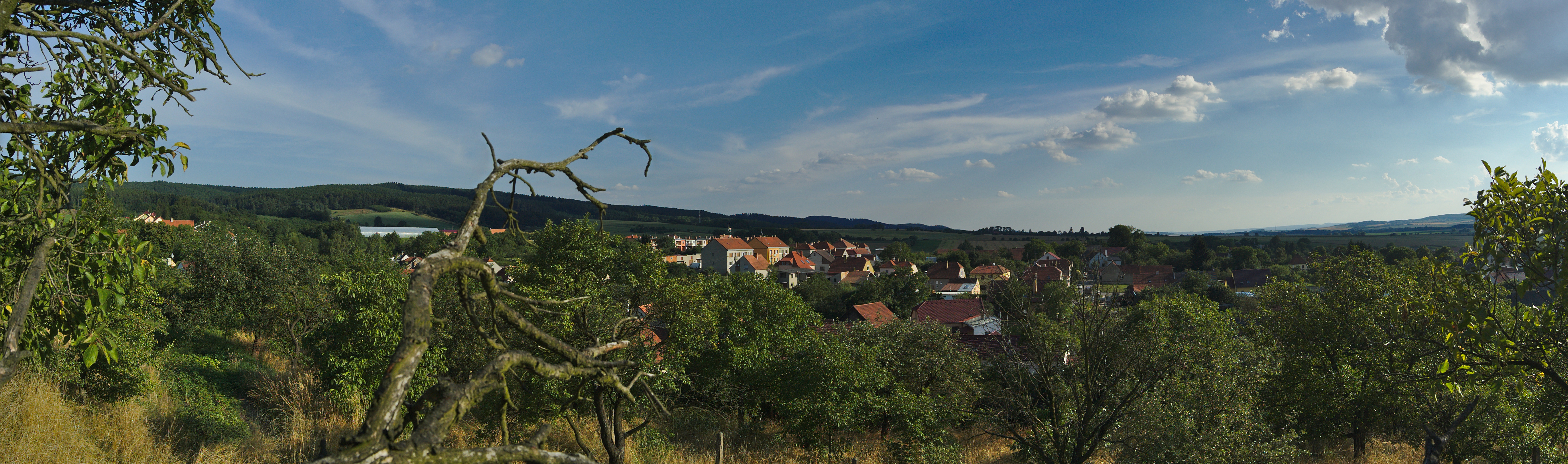 Cetkovice - panorama z kopce, okres Blansko